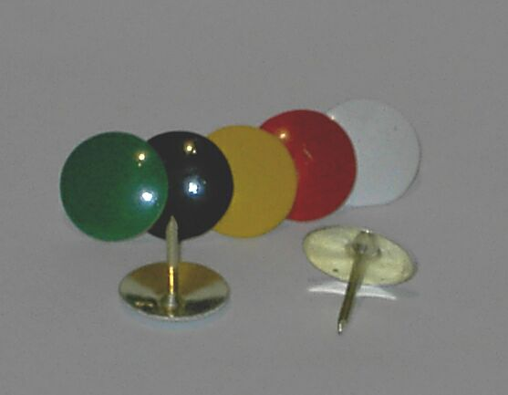 Reissnägel, Bild selbst mit Digitalkamera geknipst, GNU-FDL